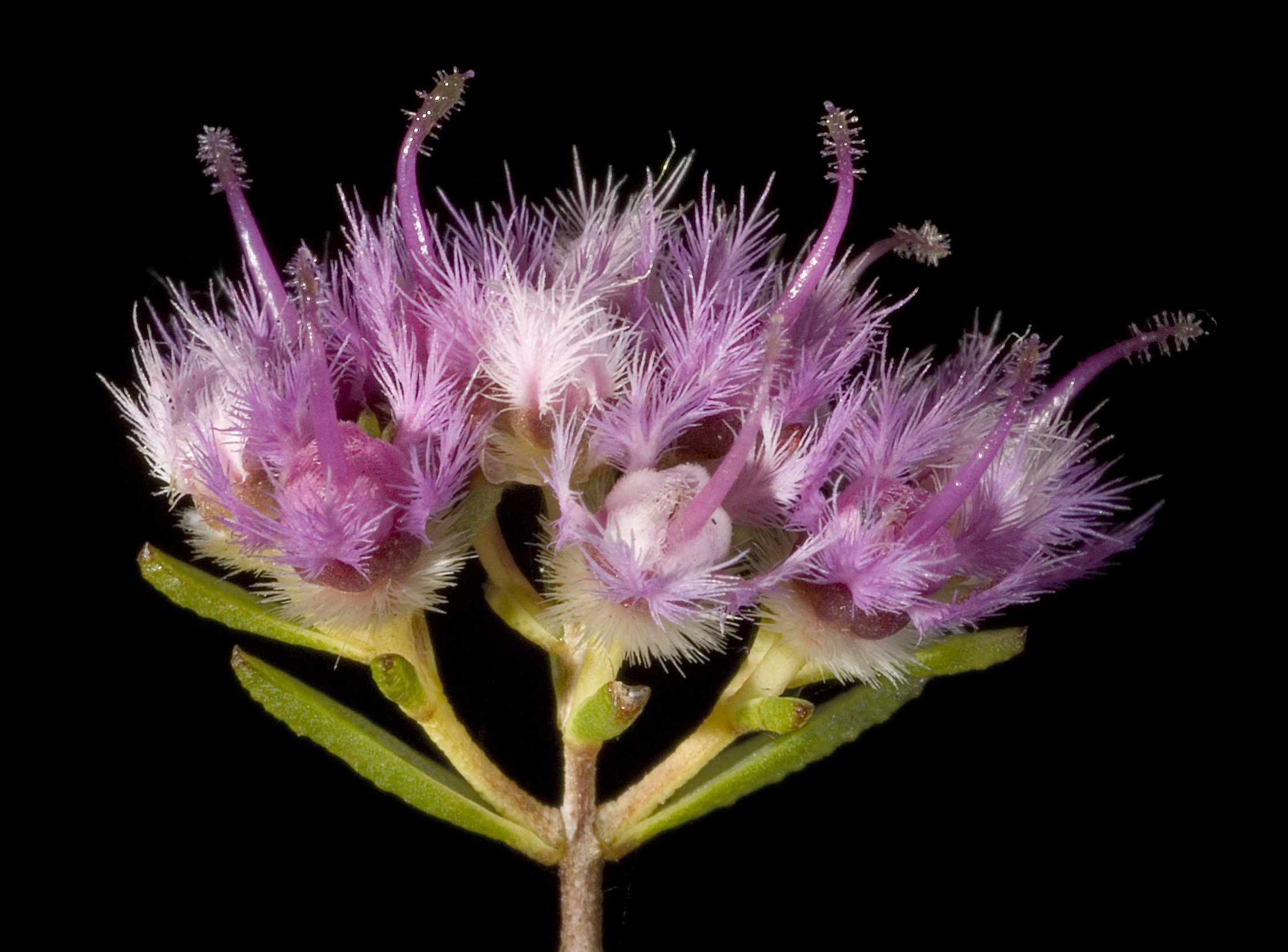 KRT3163